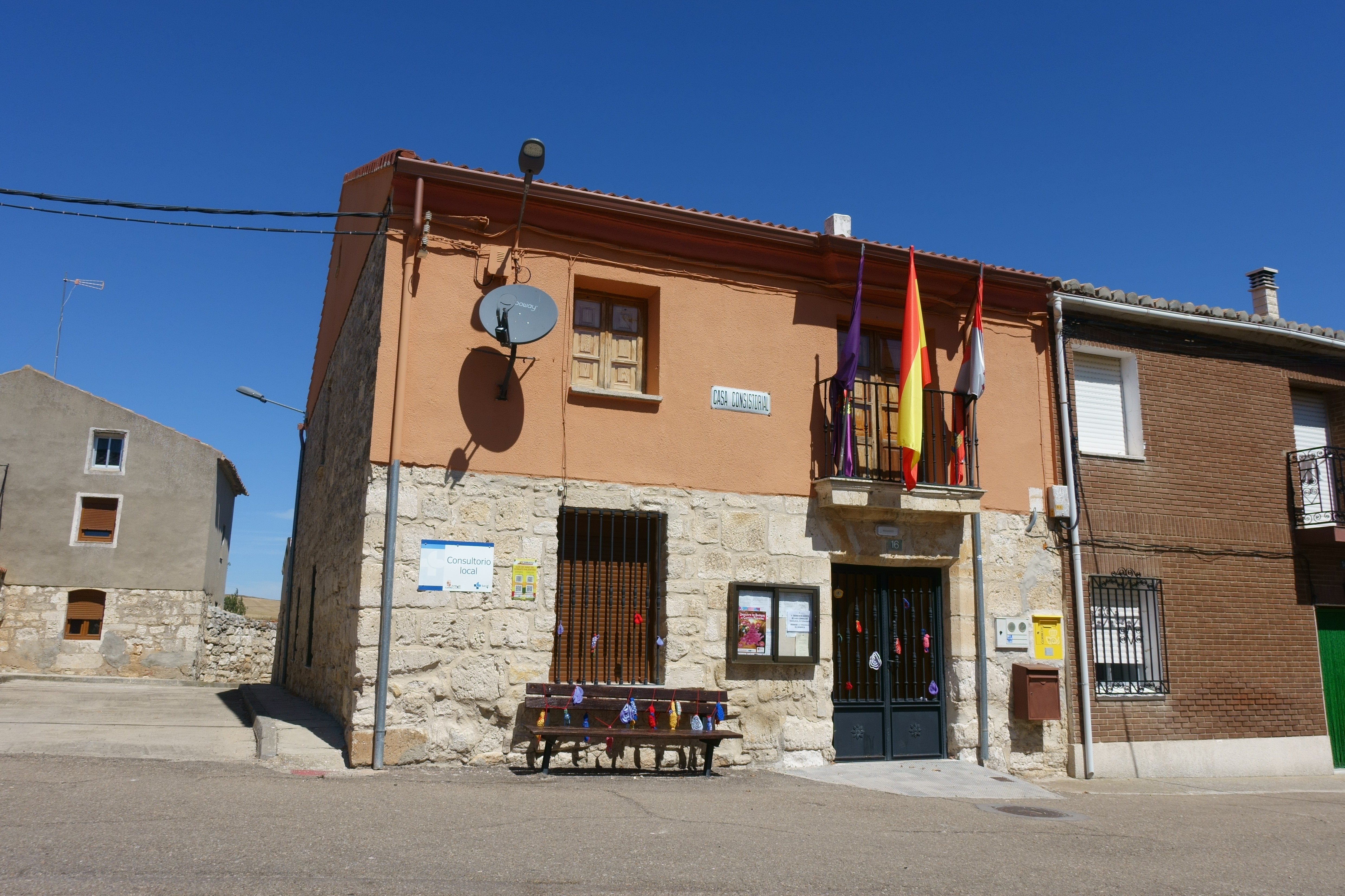 Casa consistorial de Tabanera de Cerrato (Palencia, España).